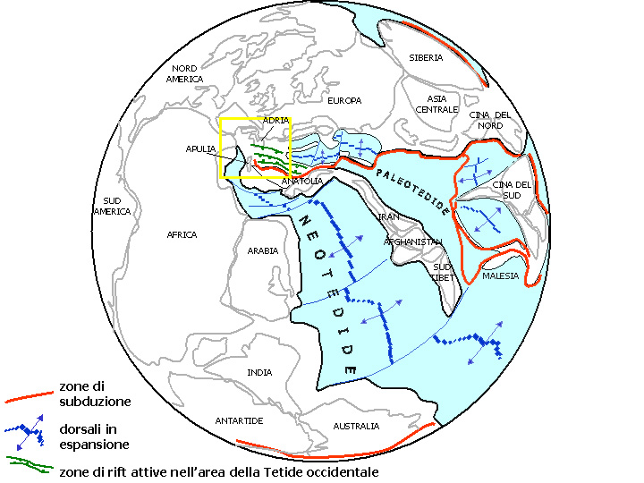 Obetrias, Karnium- ca.220 mya: Die westliche (Neo-)Tethys teilt die östliche Pangea.